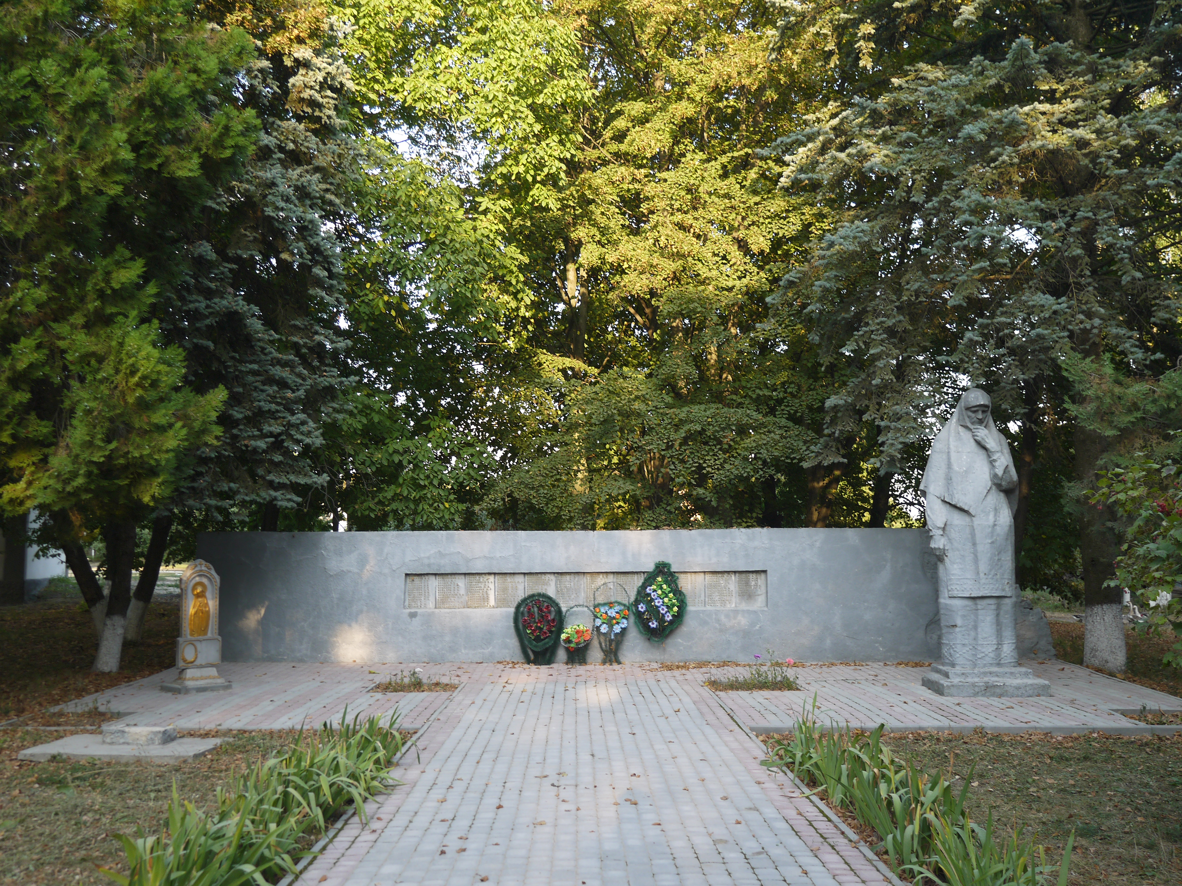 Пам'ятник 161 воїну-односельчанину, загиблому на фронтах Великої Вітчизняної війни, Пеньківка, в центрі села